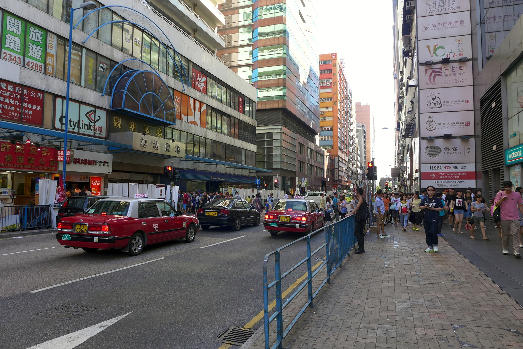 Hoi Yuen Road Pedestrian